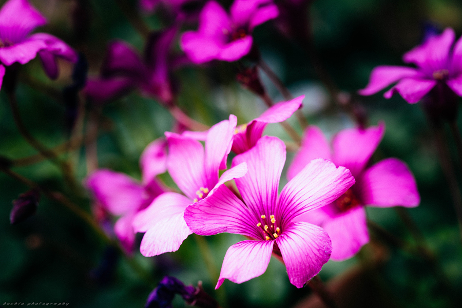 Цветы кислицы